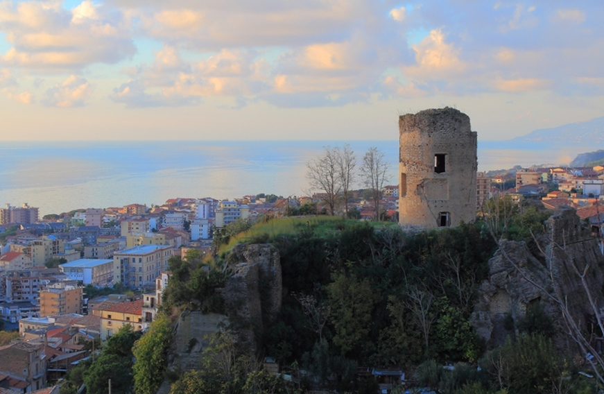 La città di Paola deve ai Normanni la costruzione del ‘’Castello di Paola’’ intorno all’anno 1110 d.C. Questa roccaforte fu eretta usando malta e tufo, in una posizione strategica che sovrastava la città e aveva lo scopo di difendere monaci e abitanti dai soldati che passavano attraverso il territorio paolano.